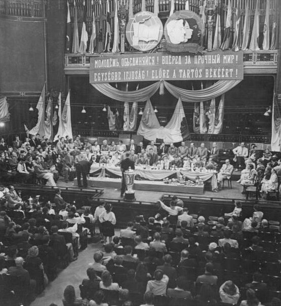 Budapest, II. Weltfestspiele, Verleihung Friedenspokal Illus XIII-Hein-Me-9.7.51 II.Weltfestspiele der Jugend 1949 in Budapest In den Räumen des Budapester Konservatioriums war die Siegerehrung der Kulturgruppen. Von 108 Preisen errang die Sowjetunion 58. Vom ZK der Partei der Ungarischen Werktätigen wurde der sowjetischen Jugenddelegation ein Friedenspokal überreicht. UBz: Blick in den Saal.